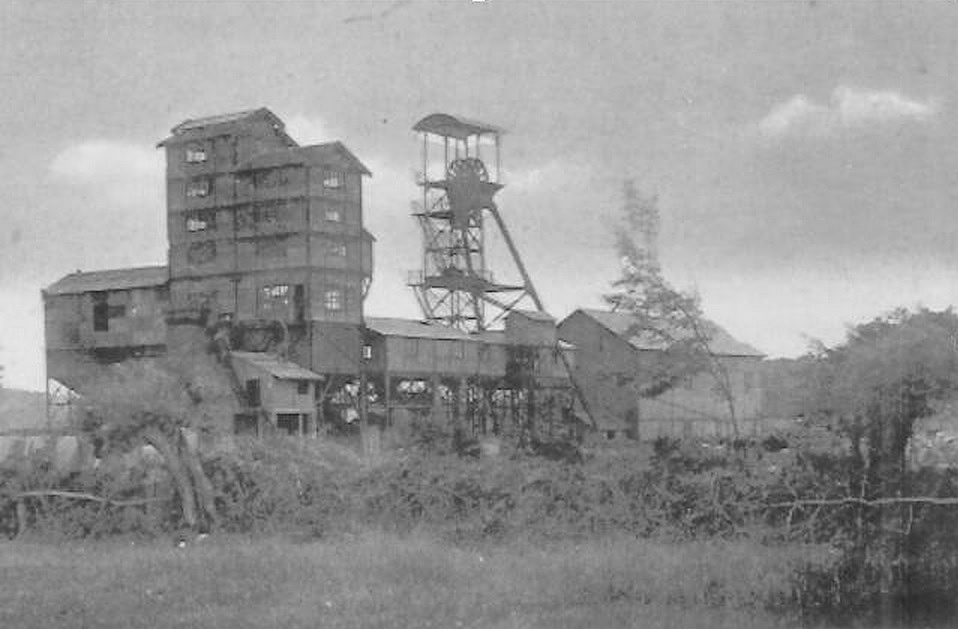 Le puits Bernard du bassin houiller de Faymoreau (Vendée, France).